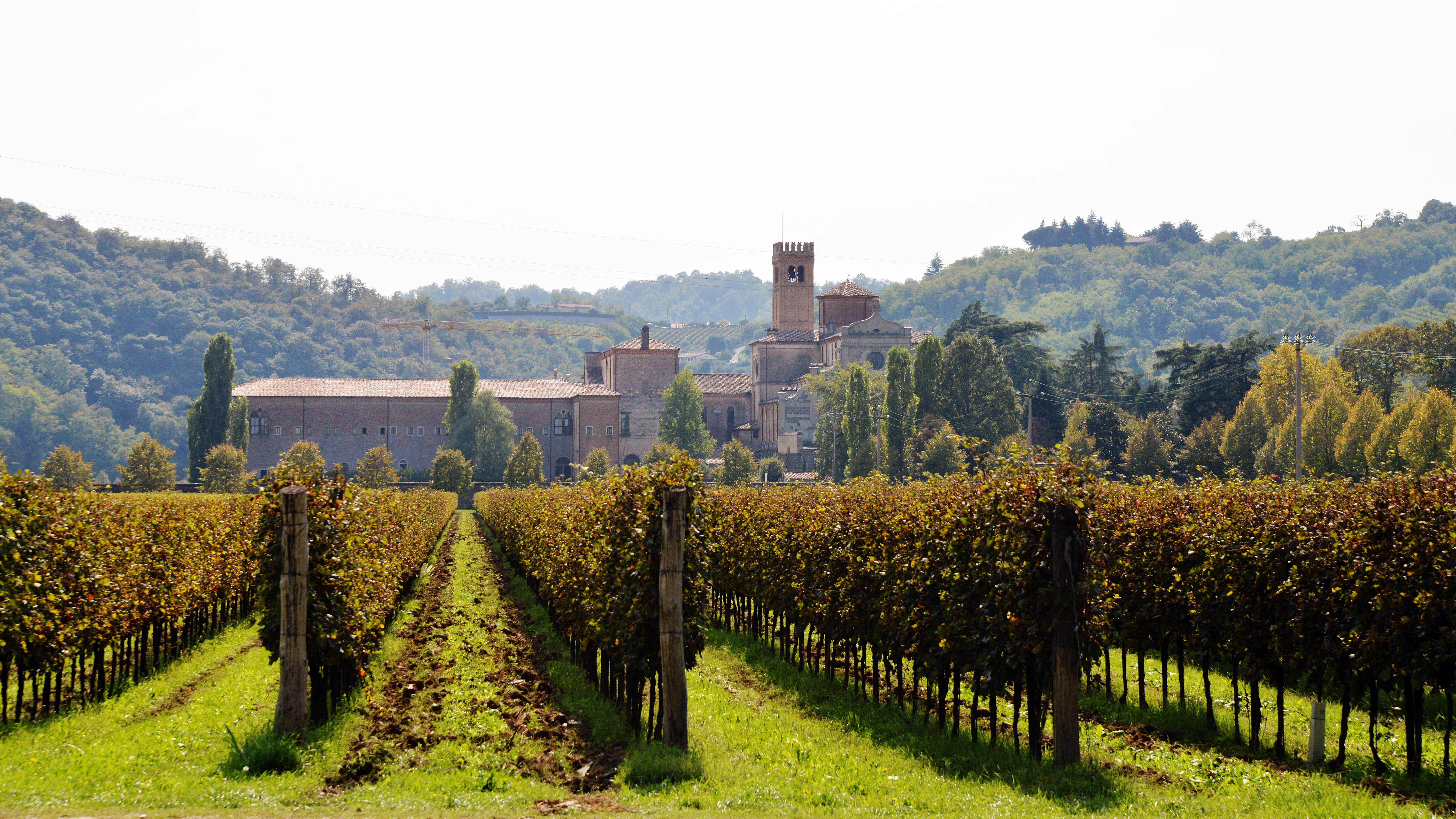 Abbazia di Praglia. I vigneti